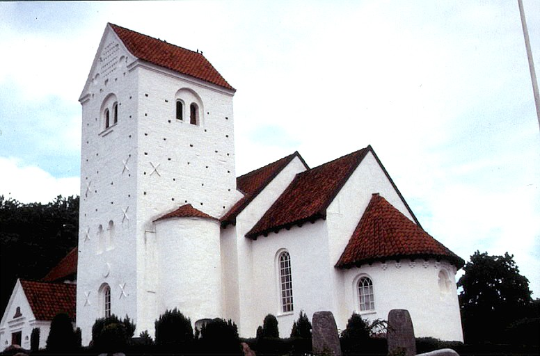 Veng kirke ligger i Veng Sogn i det tidligere Hjelmslev Herred, Skanderborg Amt. Den var oprindeligt klosterkirke i Veng Kloster